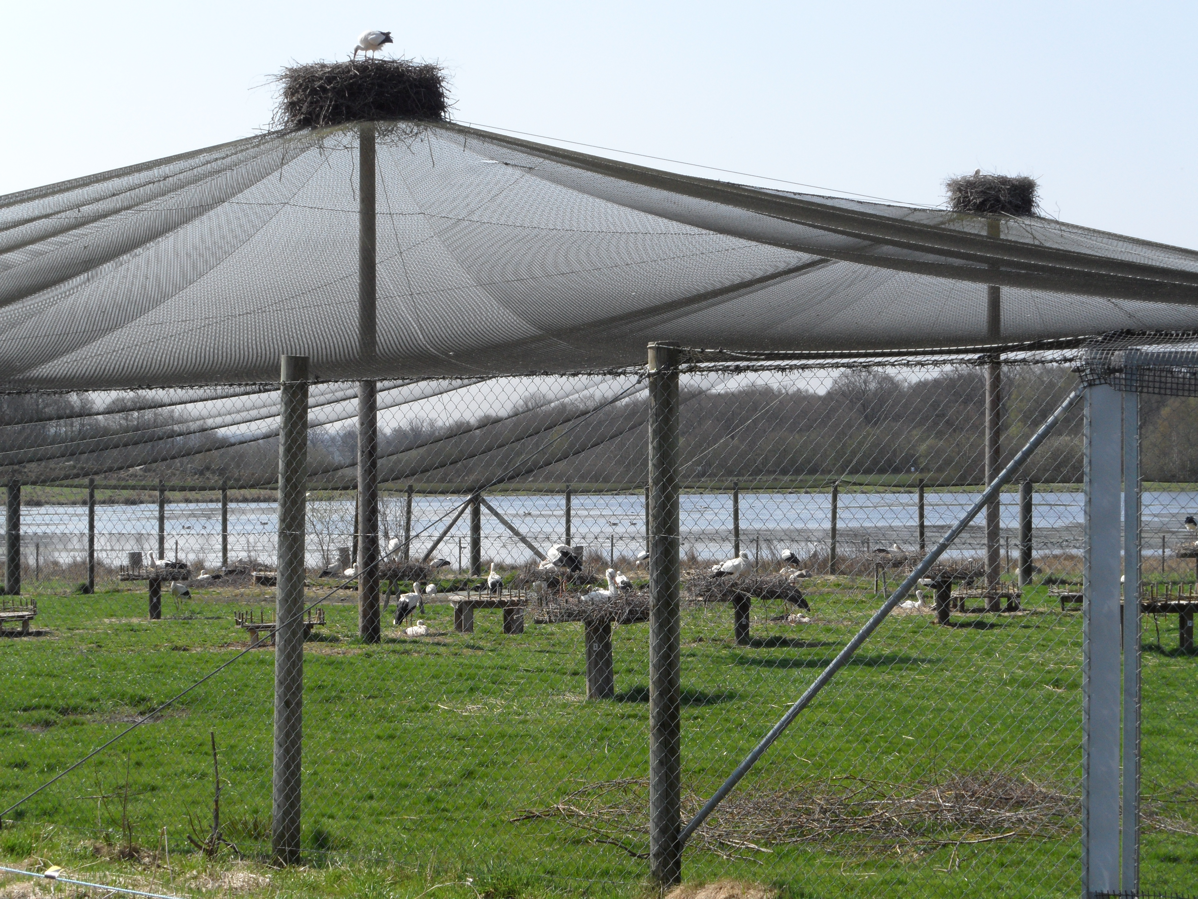 Fulltofta naturreservat storkhägn